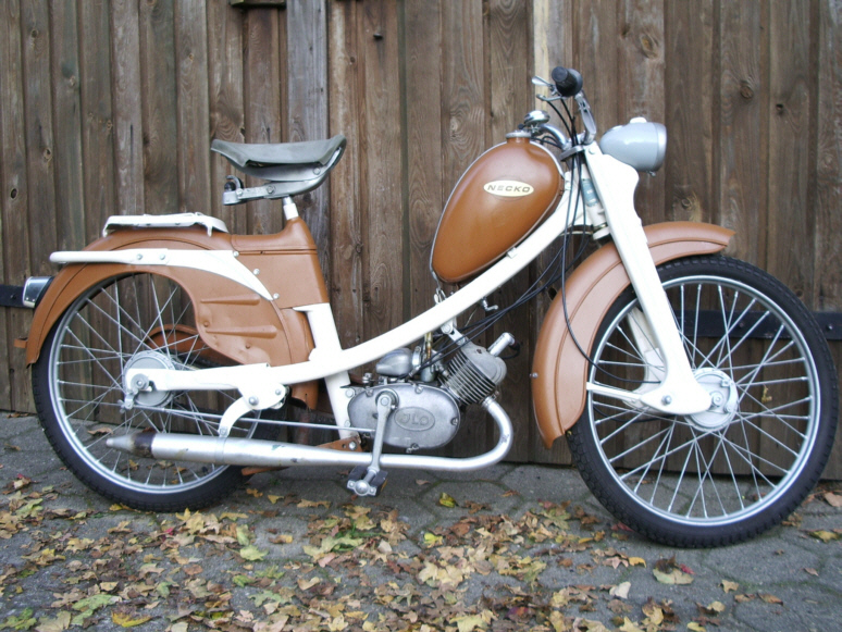 Moped der Firma Neckermann mit Jlo Piano Motor, Baujahr 1958. Eigenes Moped.